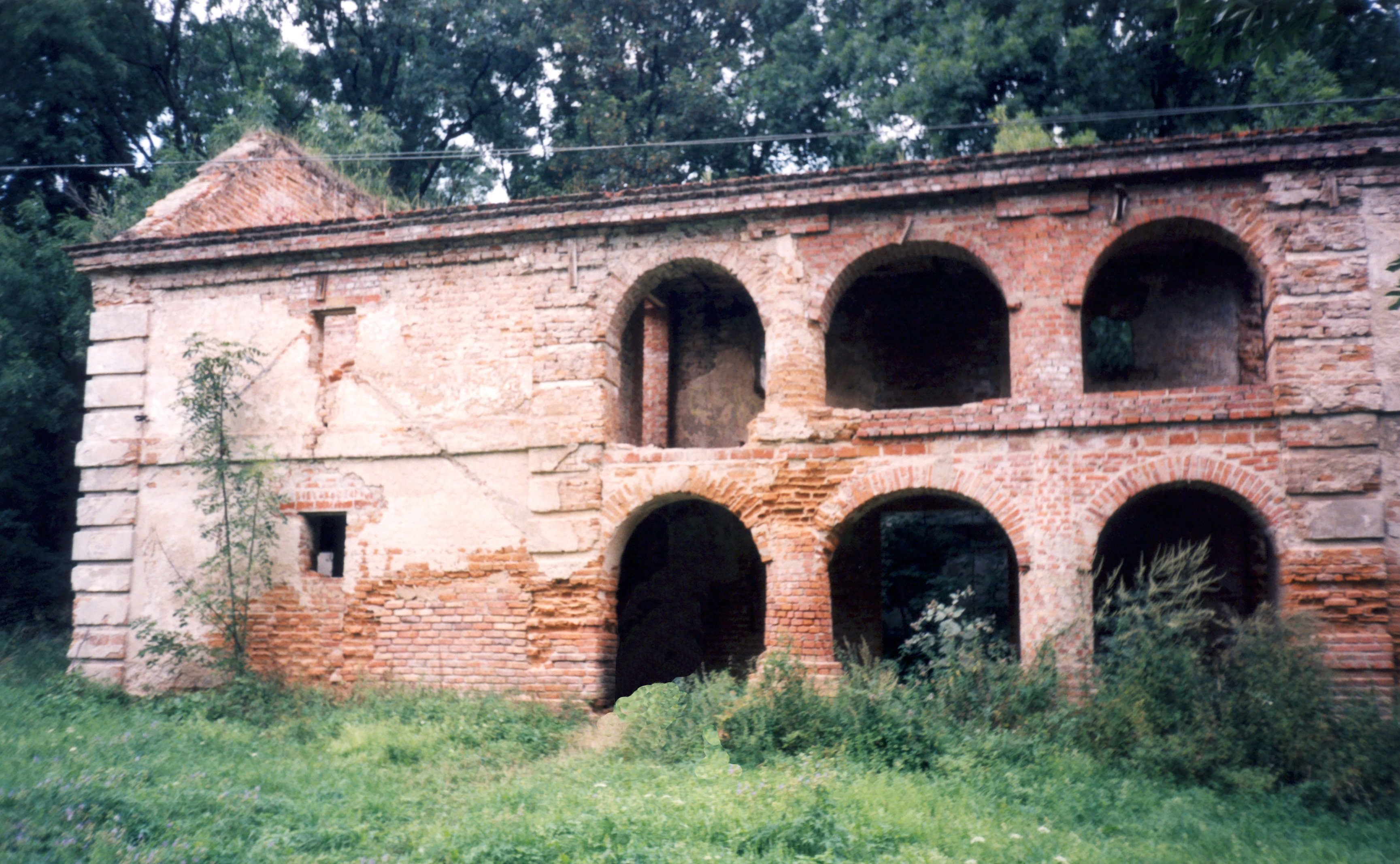 Dołhobyczów - spichlerz